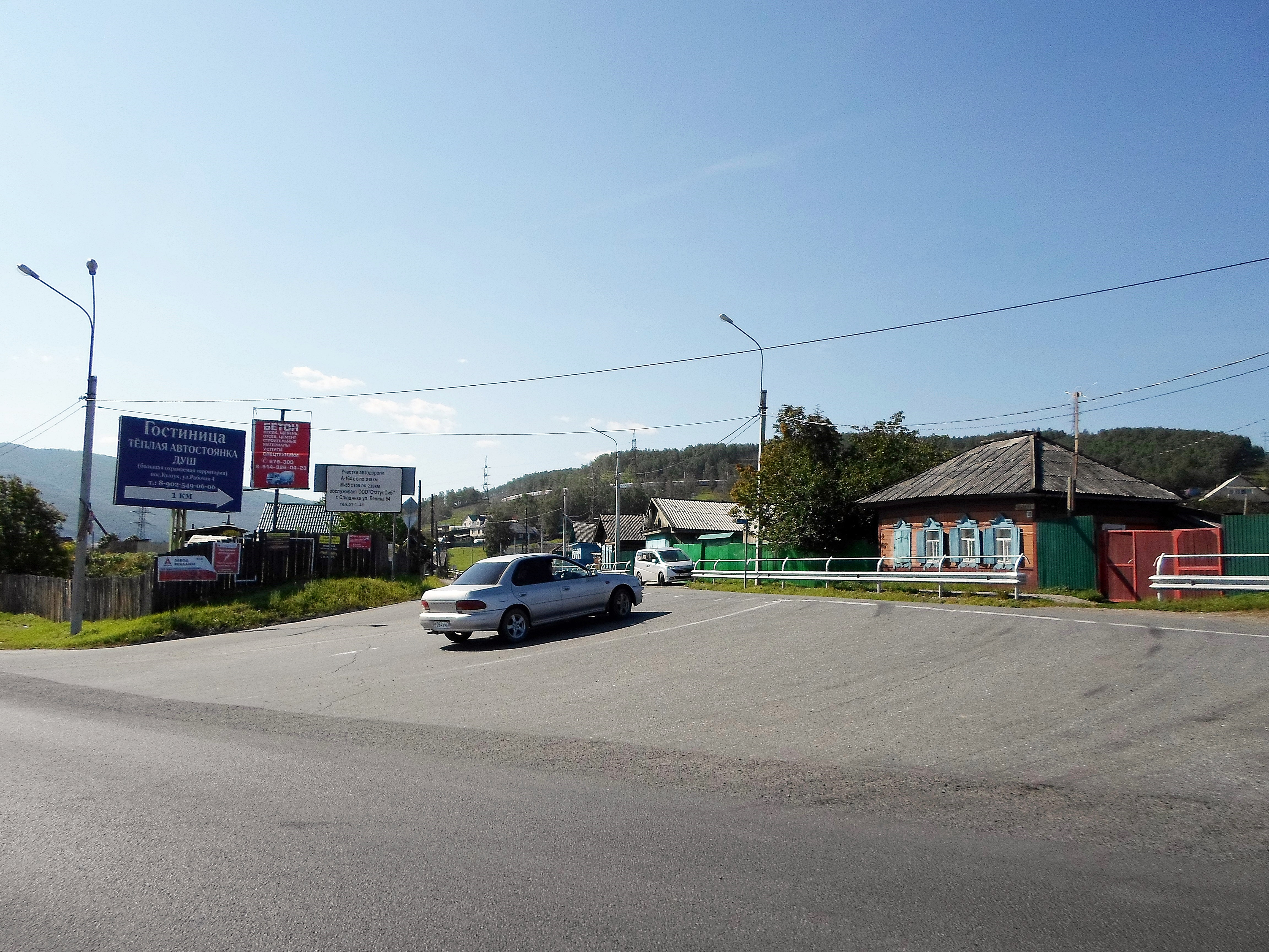 Посёлок Култук. Начало Тункинского тракта, федеральной автодороги А333, от автомагистрали Р258 "Байкал".